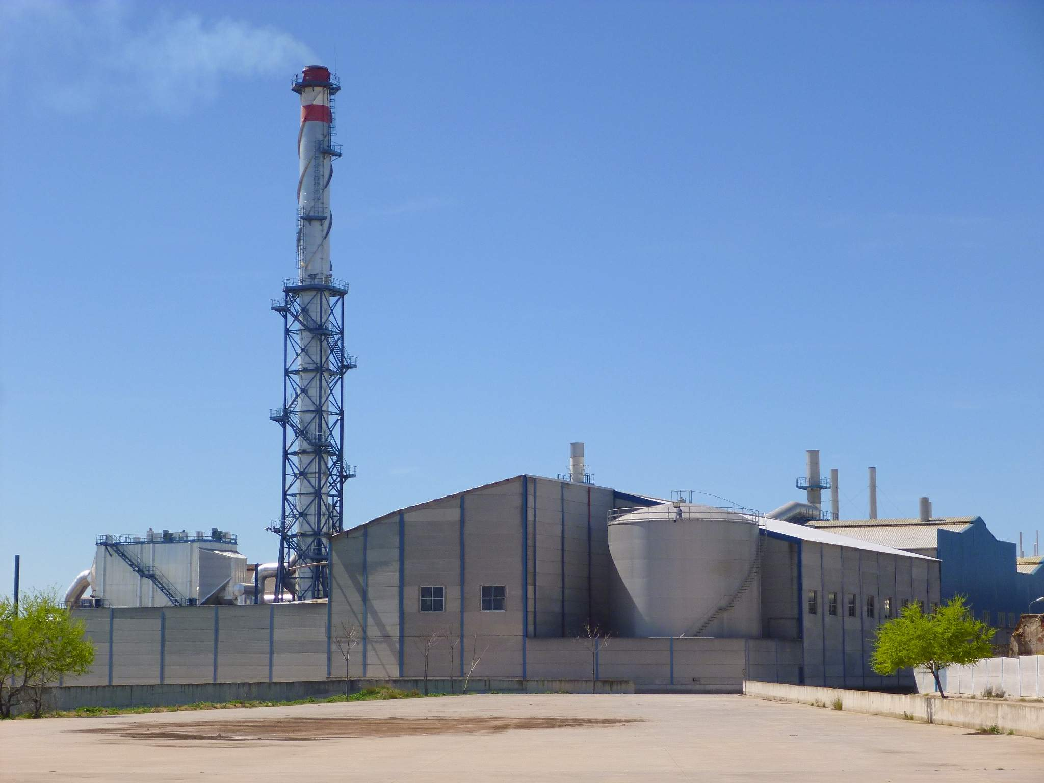 Central térmica de Movialsa, en Campo de Criptana (Ciudad Real)